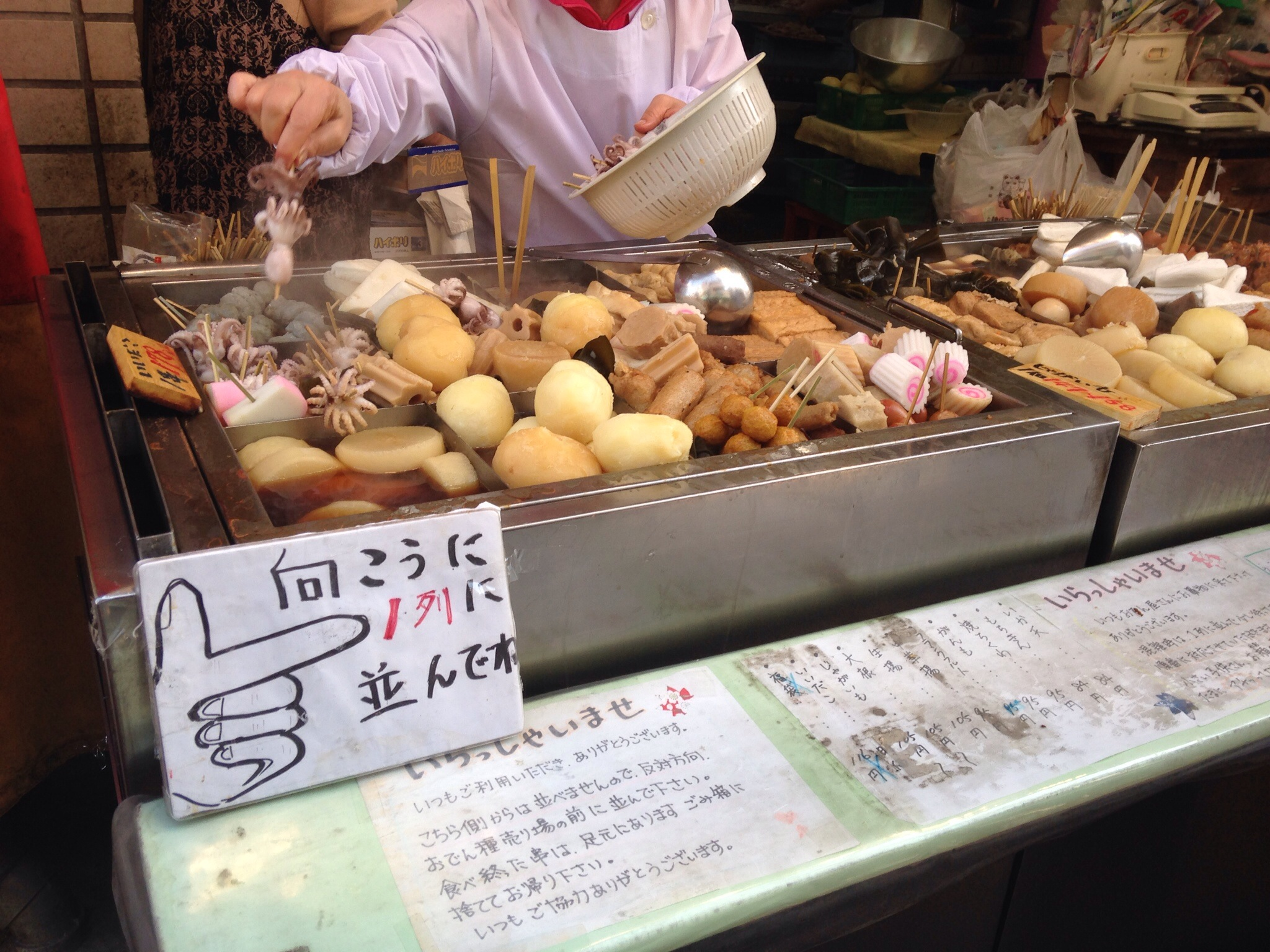 自分のフォトストリーム-927